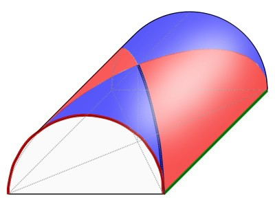 Vault elements (in German): Wange - rote Fläche Kappe - blaue Fläche Widerlager - grüne Kante Schild(bogen) - rote Kante Grat(bogen) - blaue Kante Based on drawing image:Tonnengewoelbe-Test.jpg by 22:18, 28. Okt. 2004 Painter: Anton. No rights requested.